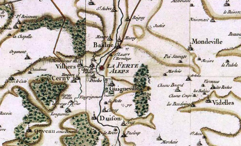 Carte de la région de La Ferté-Alais au XVIIe siècle selon Cassini